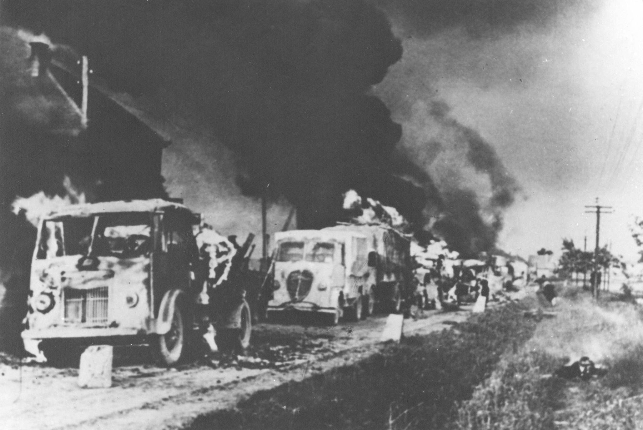 Srpskohrvatski / српскохрватски: Uništena nemačka motorizovana kolona na prilazima Zagrebu početkom maja 1945.